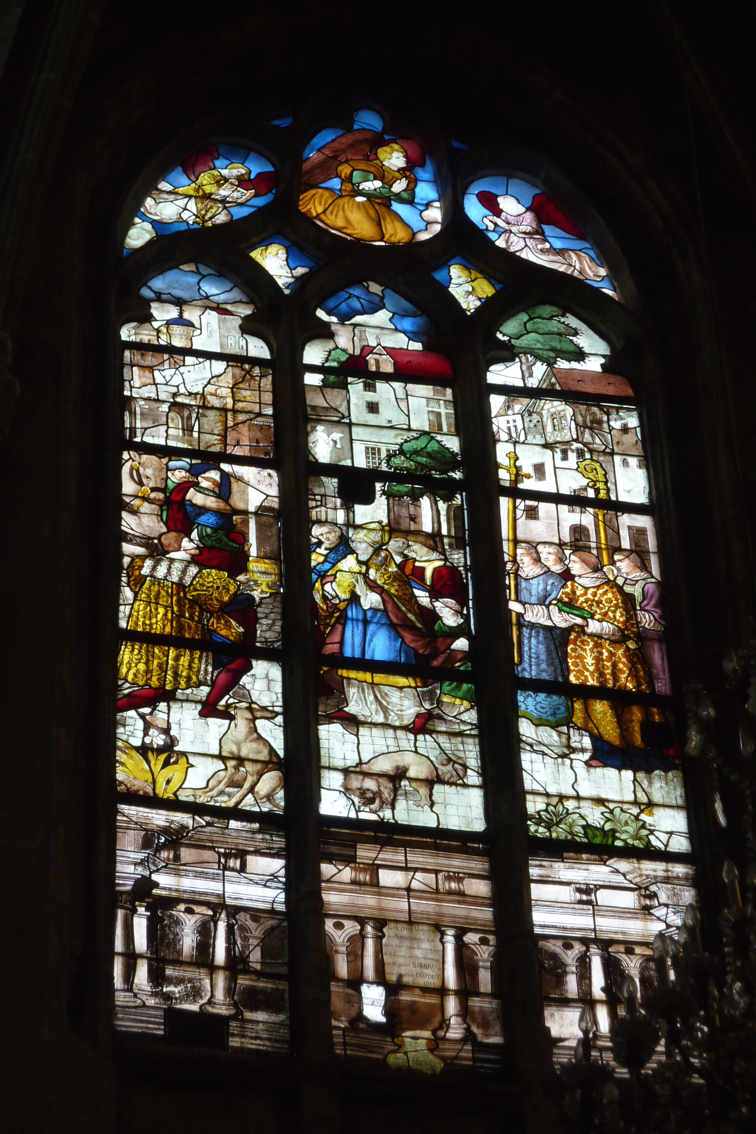 Katholische Pfarrkirche Saint-Jean-Baptiste in Nemours im Département Seine-et-Marne in der Region Île-de-France (Frankreich), Bleiglasfenster im Chor um 1550; von Laurent Marchant, Darstellung: Gauthier von Nemours schenkt dem Erzbischof von Sens die Reliquien von Johannes dem Täufer